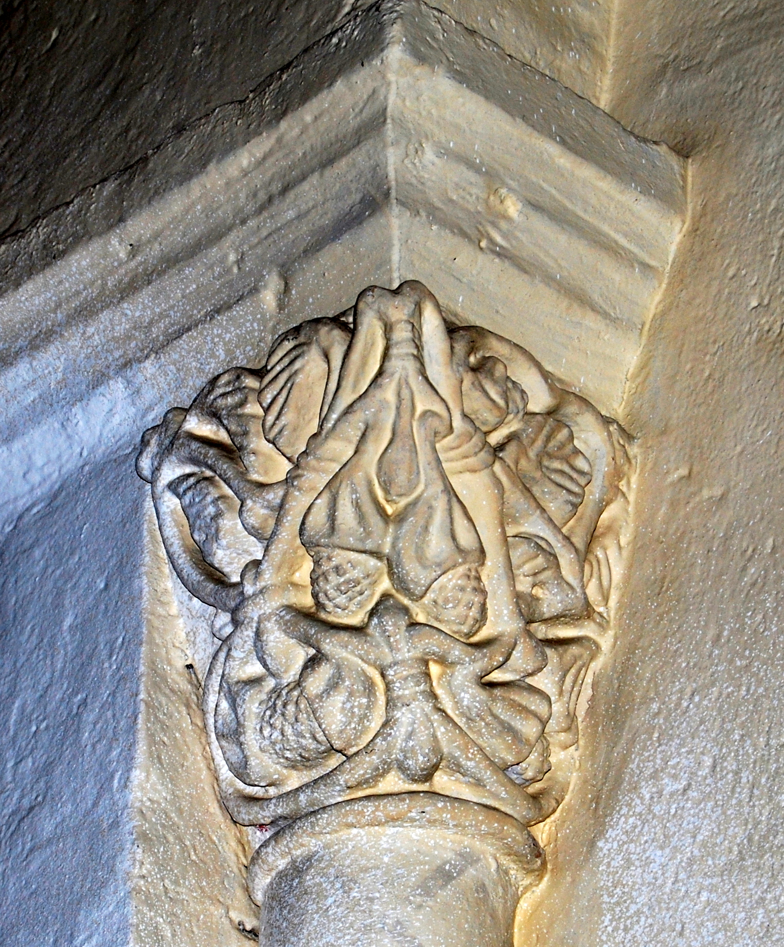 Chapiteaux de l'église Notre-Dame de Lestiac-sur-Garonne